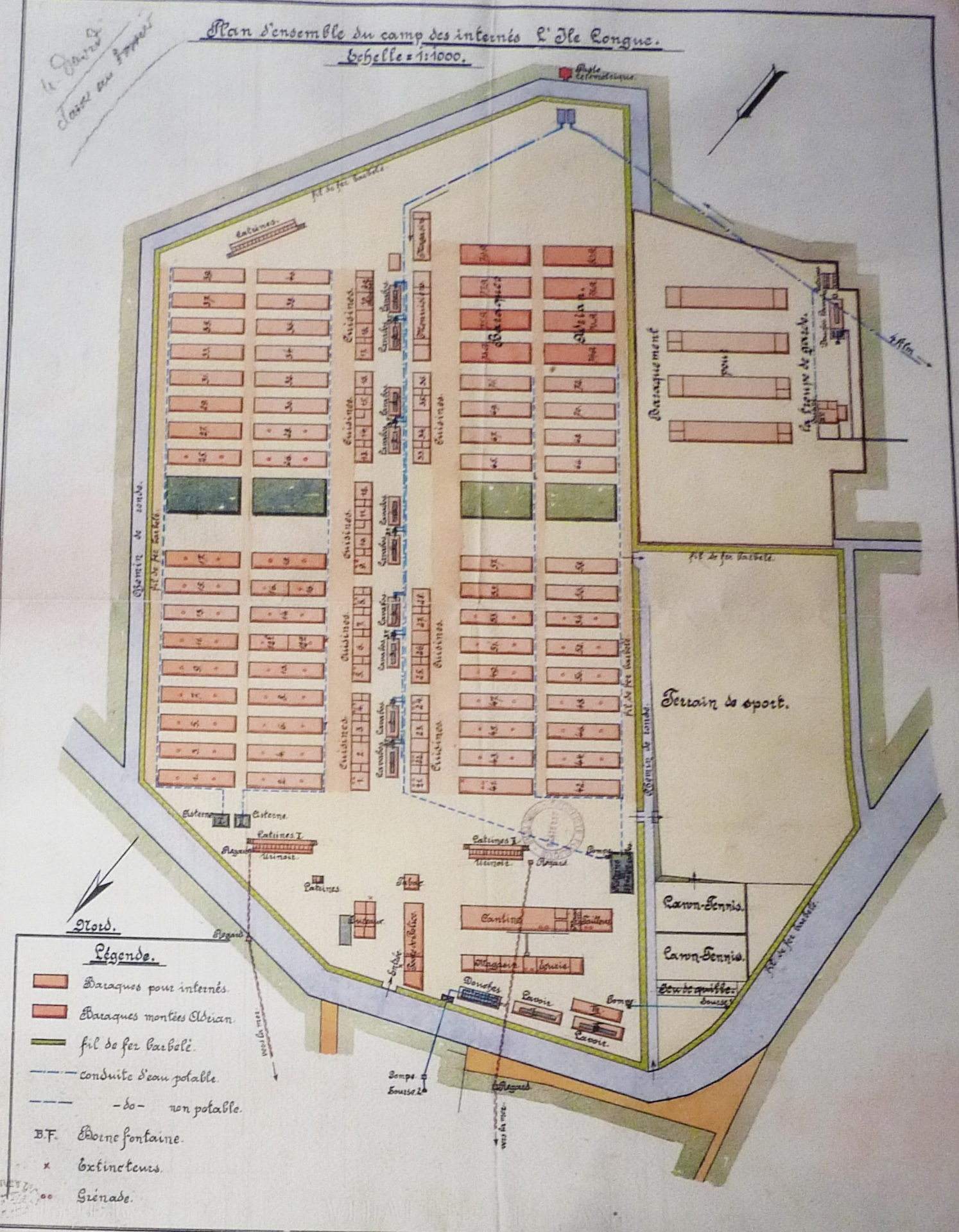 Plan d'ensemble du camp des prisonniers de guerre de l'Île Longue (plan dessiné par le lieutenant-colonel commandant le Génie de la Place de Brest)